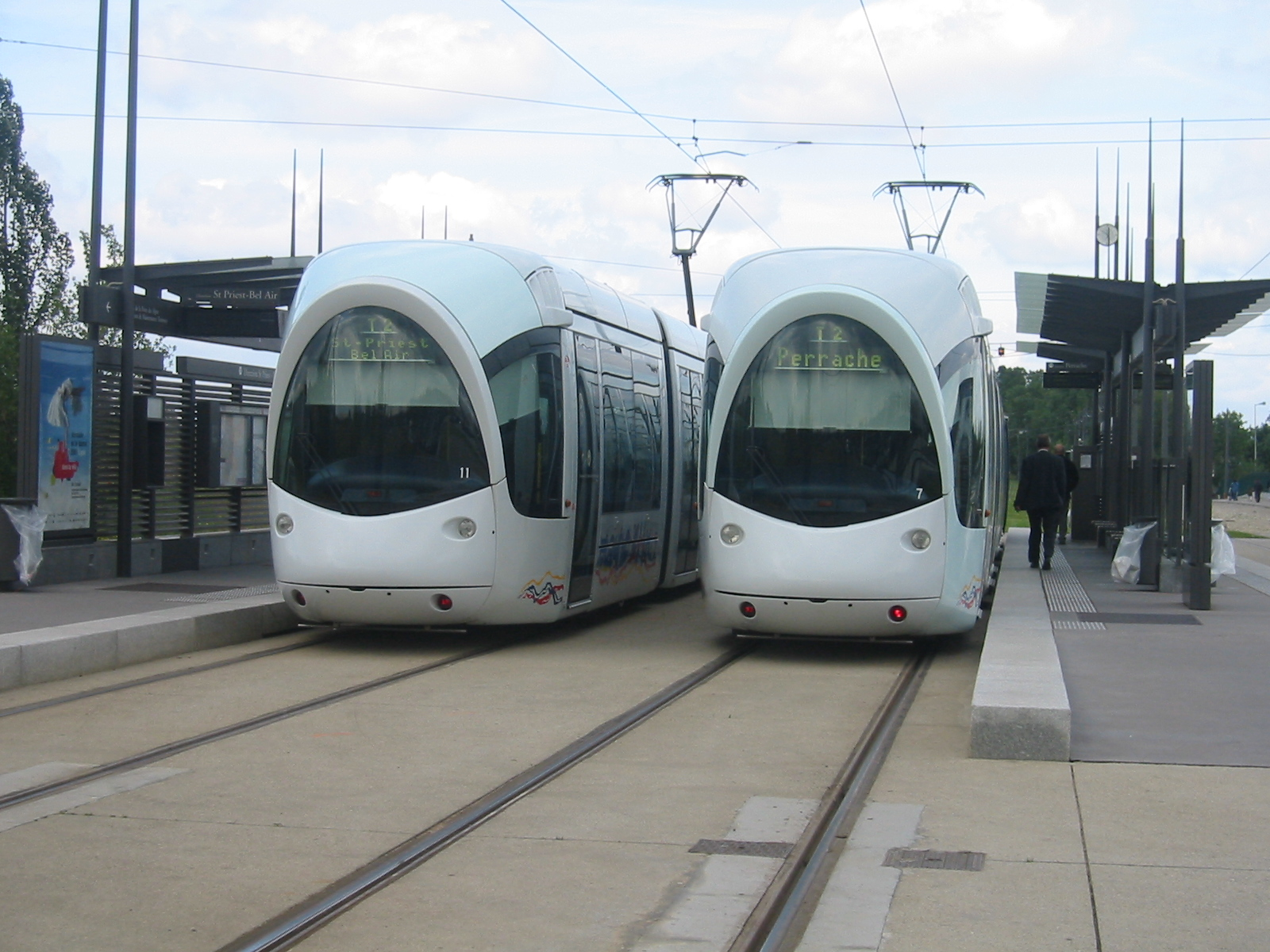 Tramway de Lyon, ligne T2, station Porte des Alpes.